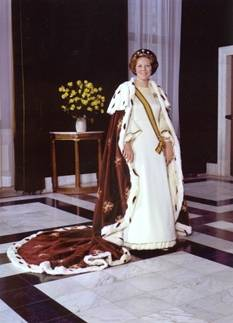 Koningin Beatrix, 1980